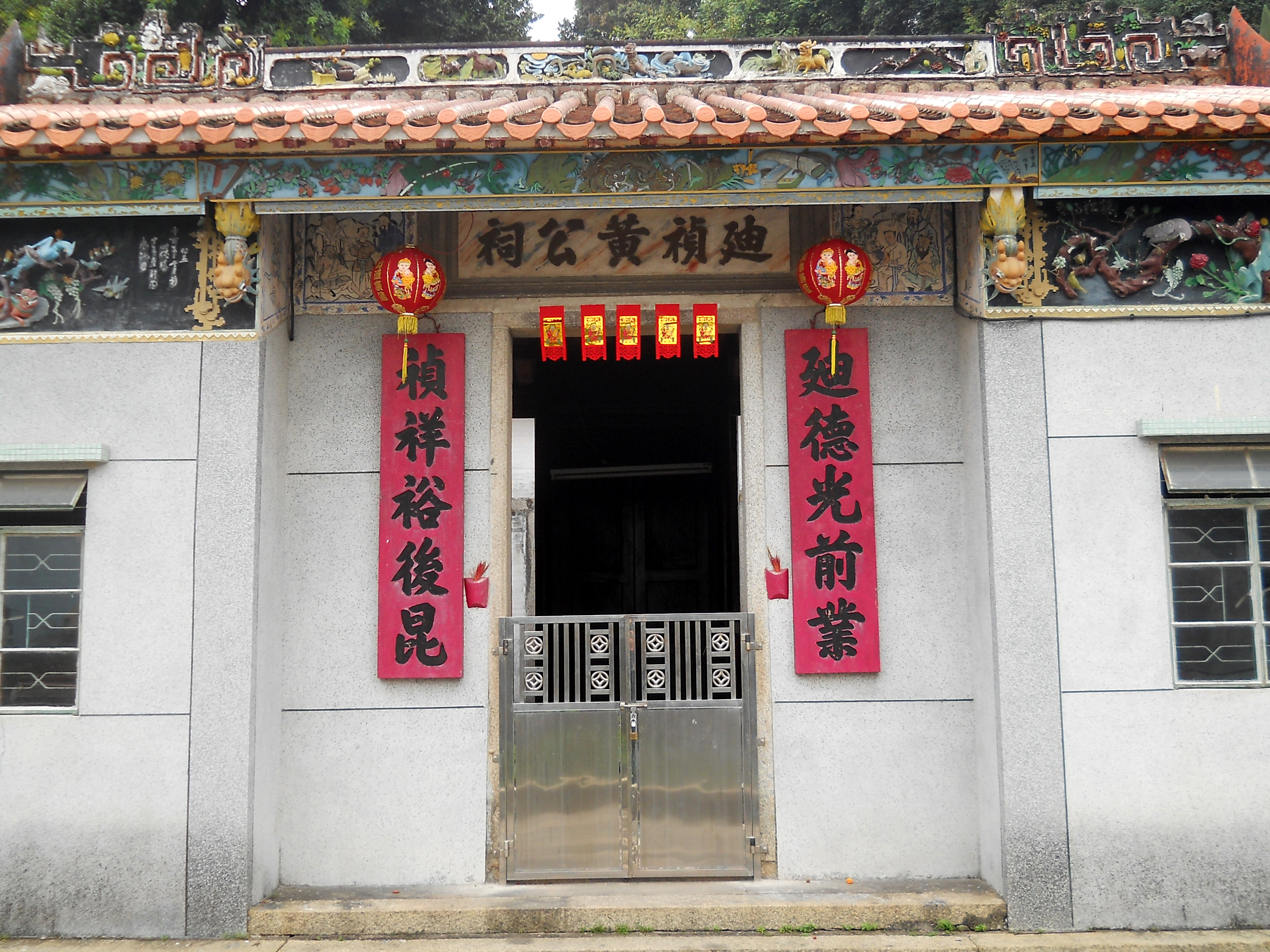 中文（香港）: 迪禎黃公祠